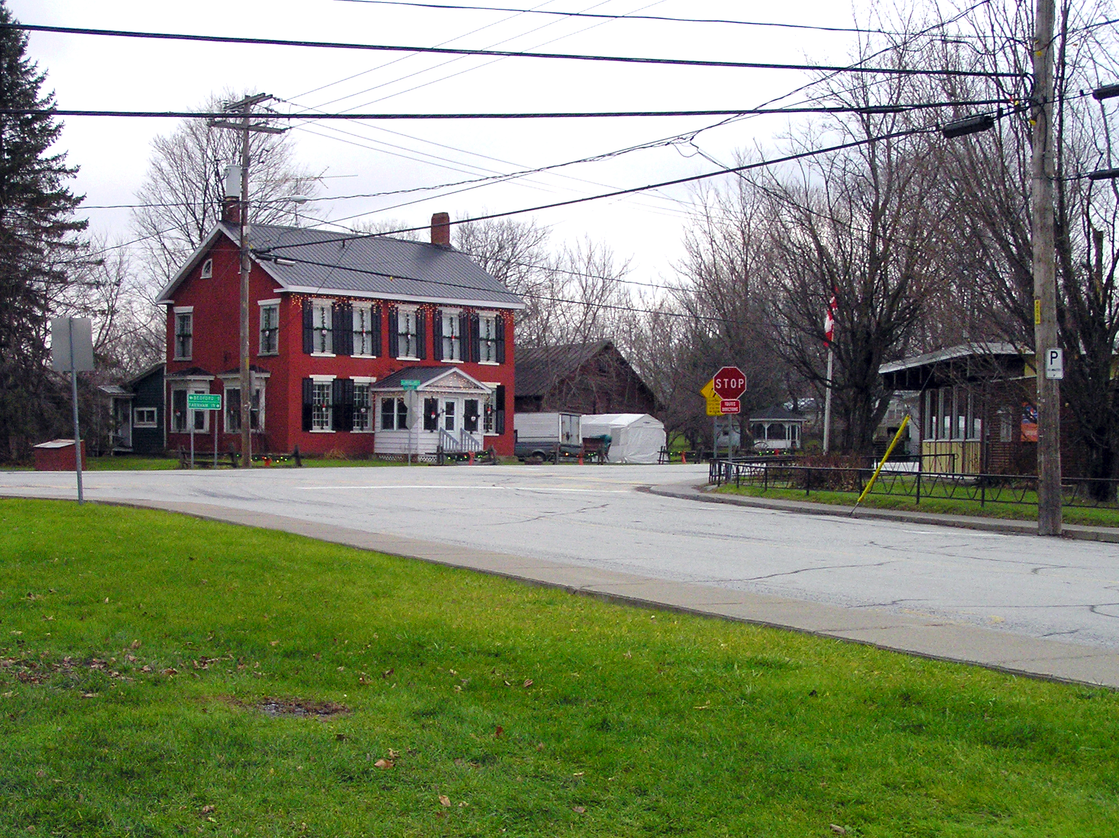 Stanbridge East - Carrefour de River et Maple. A droite la Poste